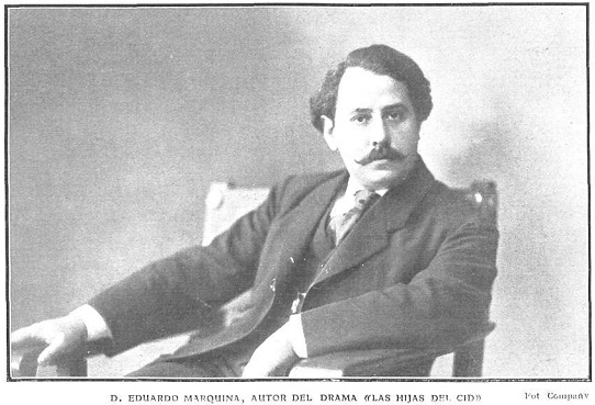 Retrato del dramaturgo Eduardo Marquina, obra de Manuel Compañy, recogido en la revista española Actualidades.